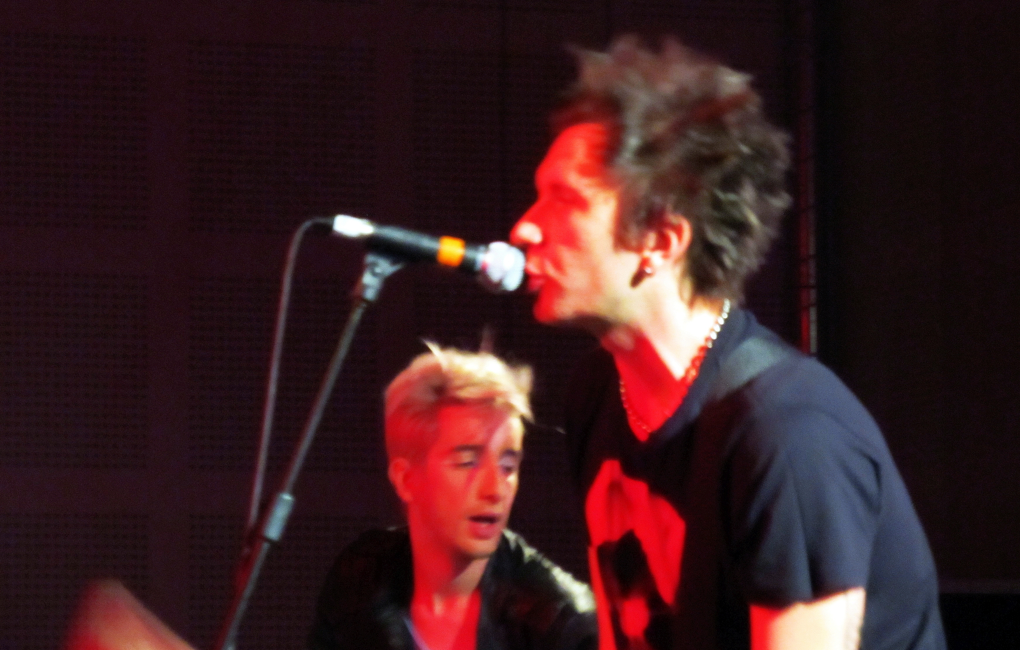 Concerto Artisti valdostani per l'Emilia (Cittadella di Aosta, 8 luglio 2012): dARI